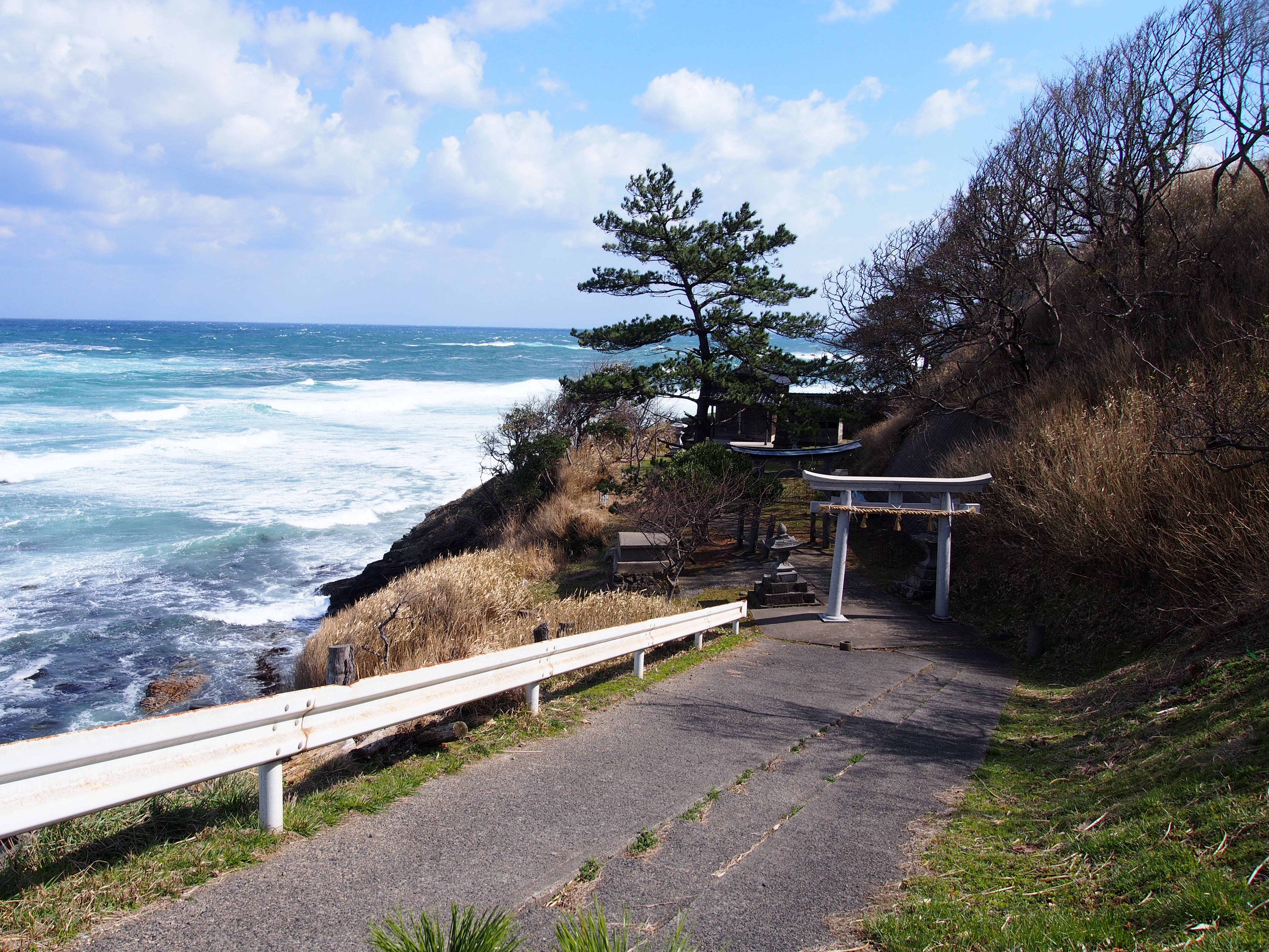 加茂神社（京都府京丹後市網野町磯）境内